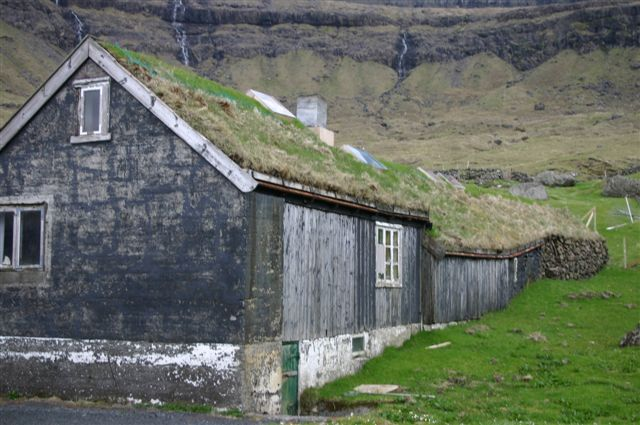 Old Farm on Depil, Faroe Islands